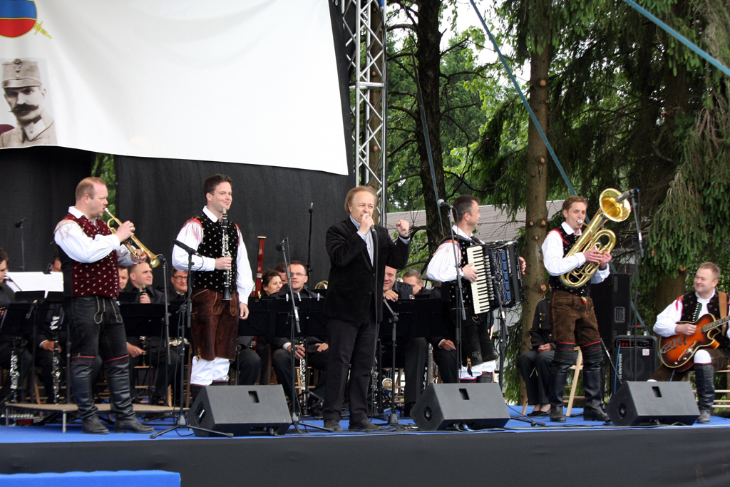 Alfi Nipič in Kvintet Orkestra Slovenske vojske na Osrednji slovesnost ob dnevu Slovenske vojske (4d.rtvslo.si).